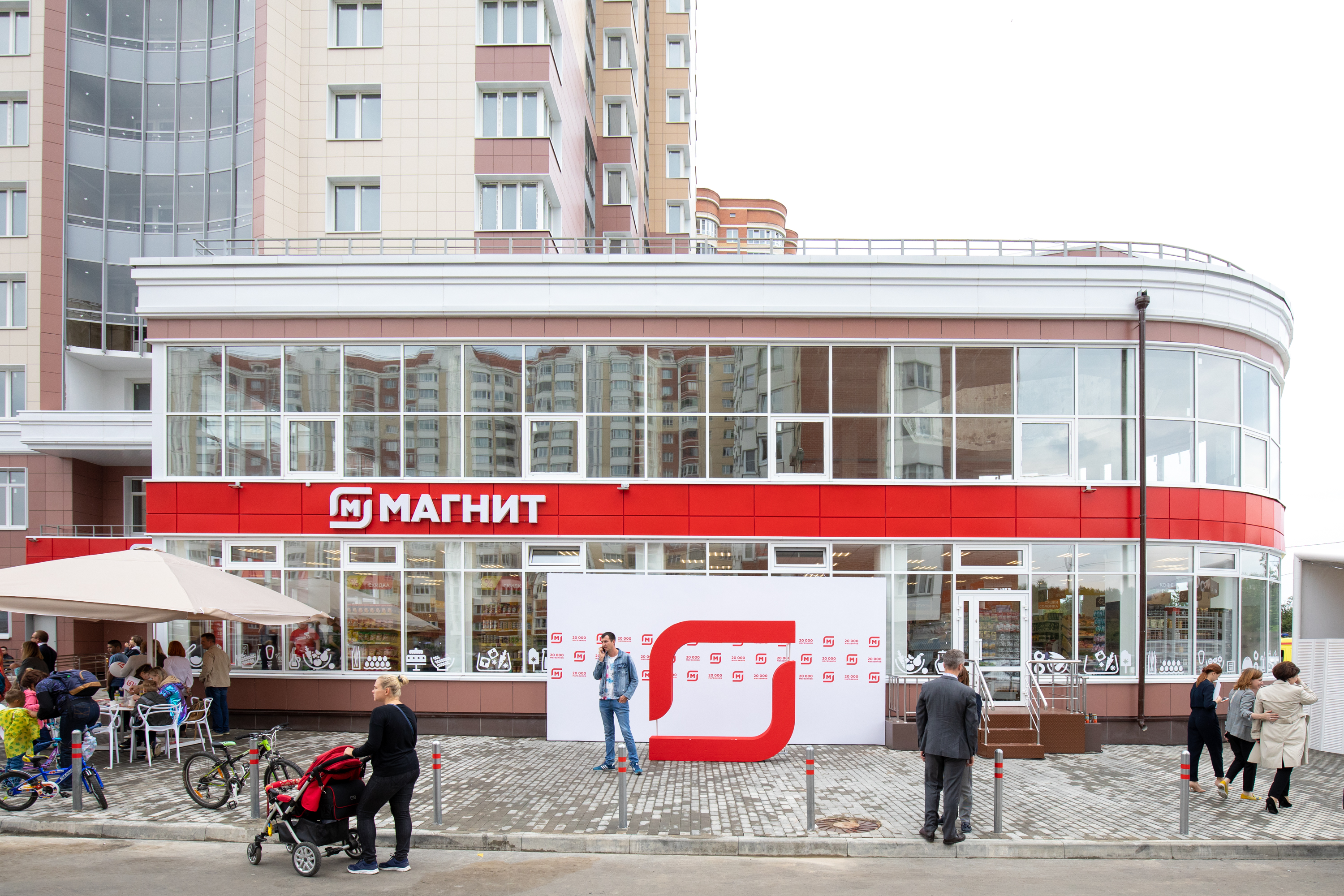 Россия, Королёв, 2019 год